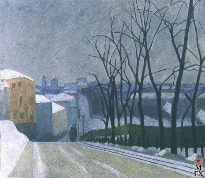 "Рождественский бульвар" Rozhdestvensky boulevard